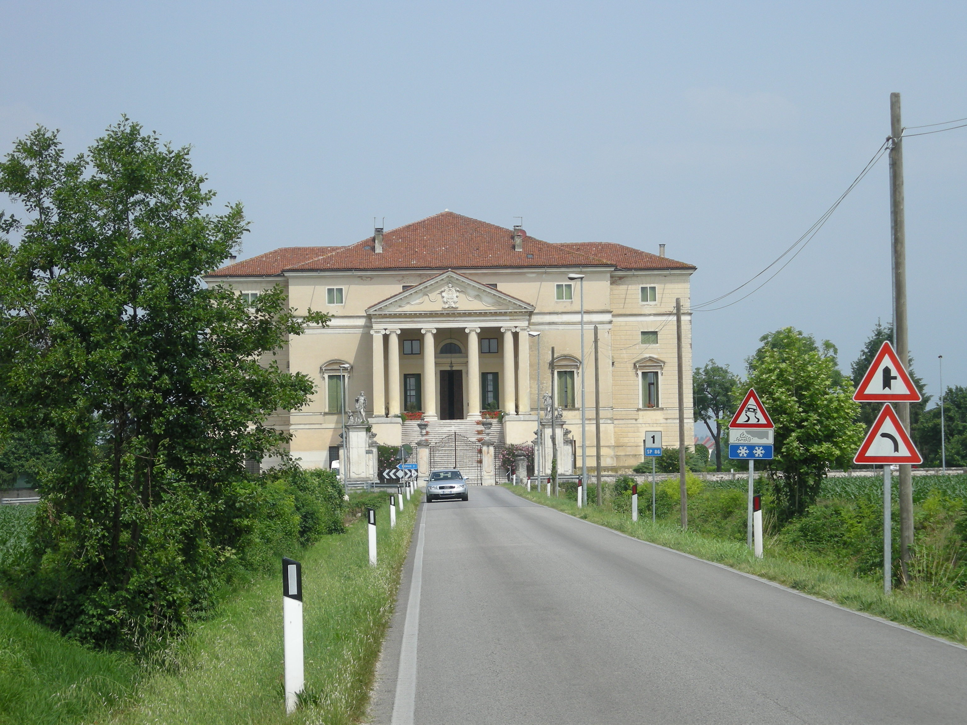 Dueville, Vicenza, Italy, Villa Da Porto - Casarotto (Ottone Calderari, 1770)